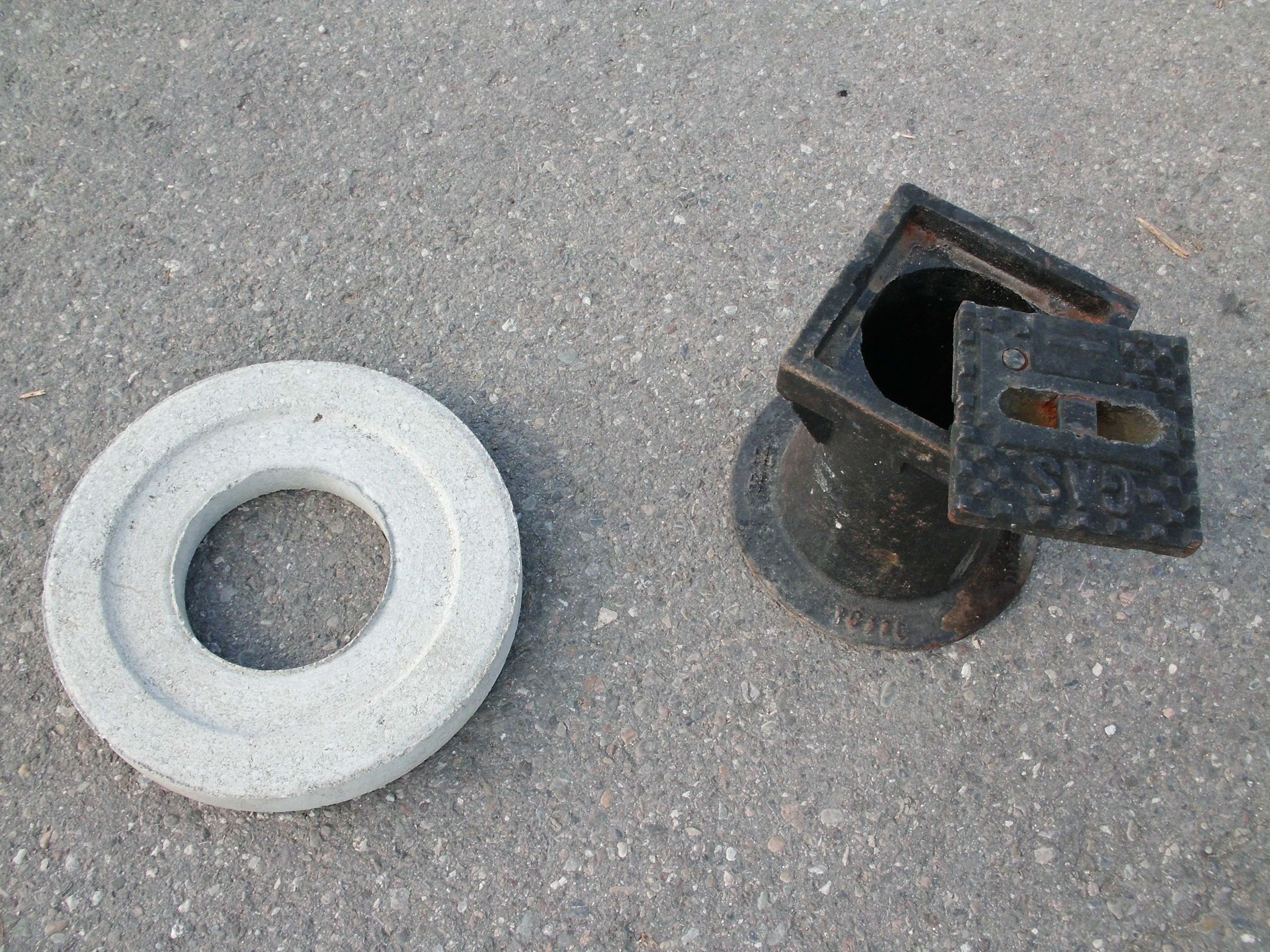 Starre Straßenkappe geöffnet mit Tragplatte aus Beton